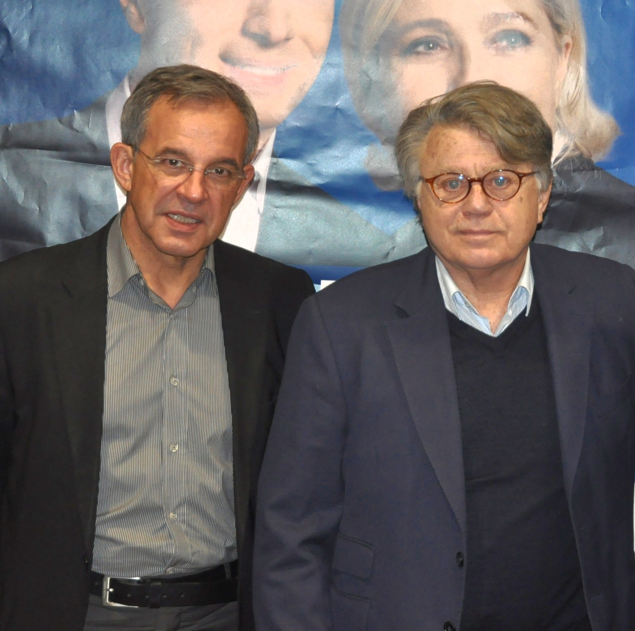 Thierry Mariani (à gauche) et Gilbert Collard (à droite), lors d'un meeting électoral européen le 25 avril 2019 à Besançon.